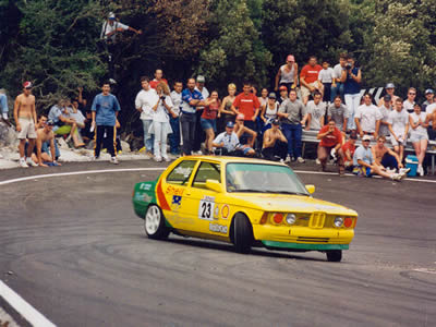 Foto de Daniel Sordo Jr al volante de un BMW en la Subida a la Bien Aparecida